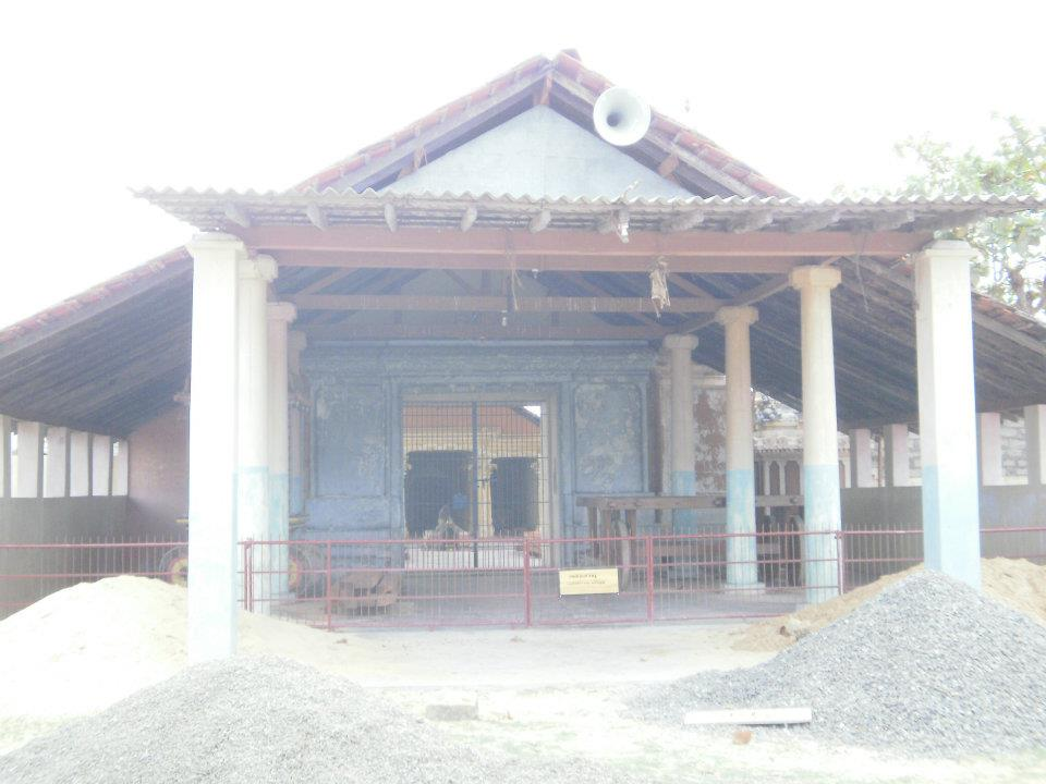 பழைய முகப்பு